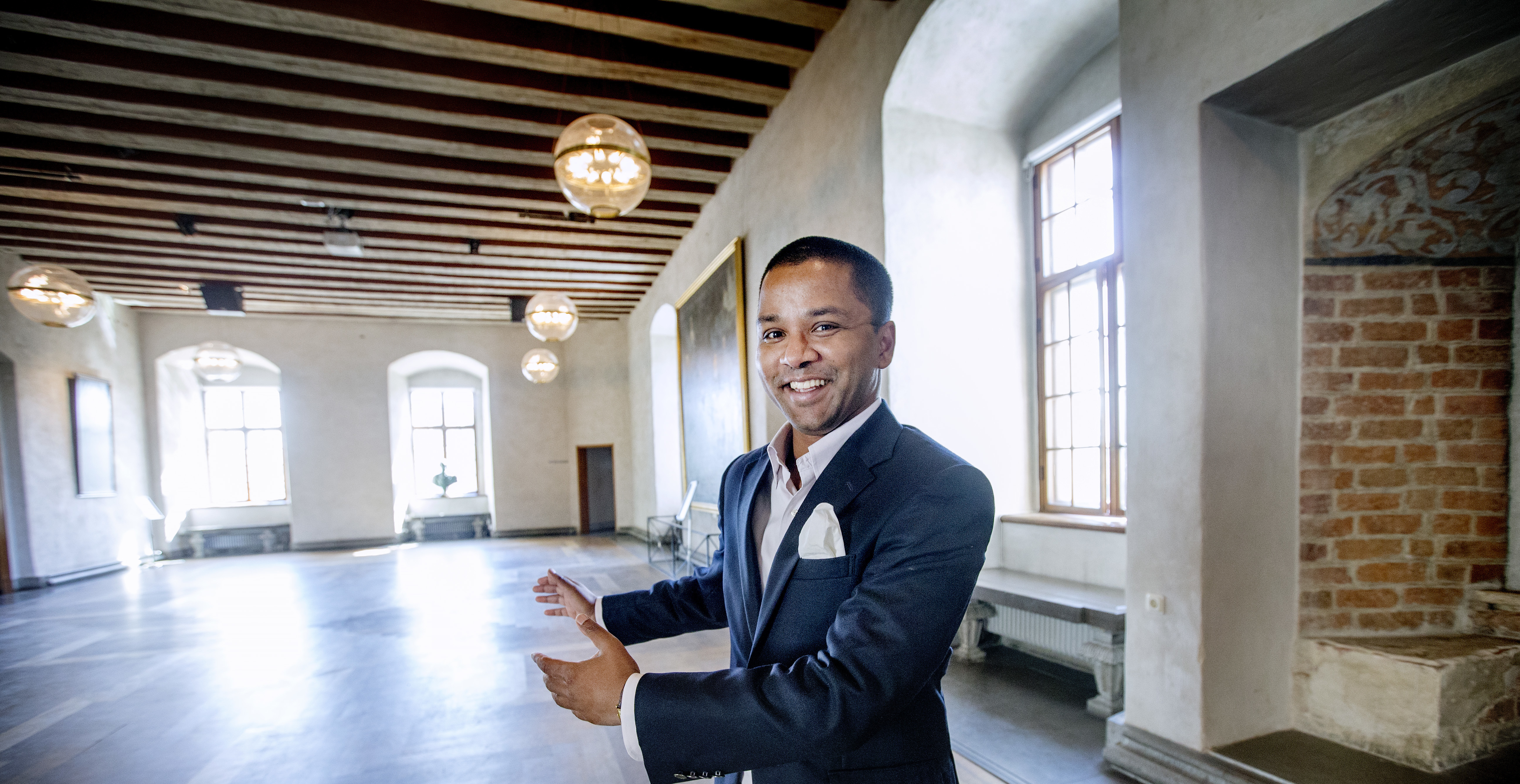 David Lindén i rikssalen på Örebro slott